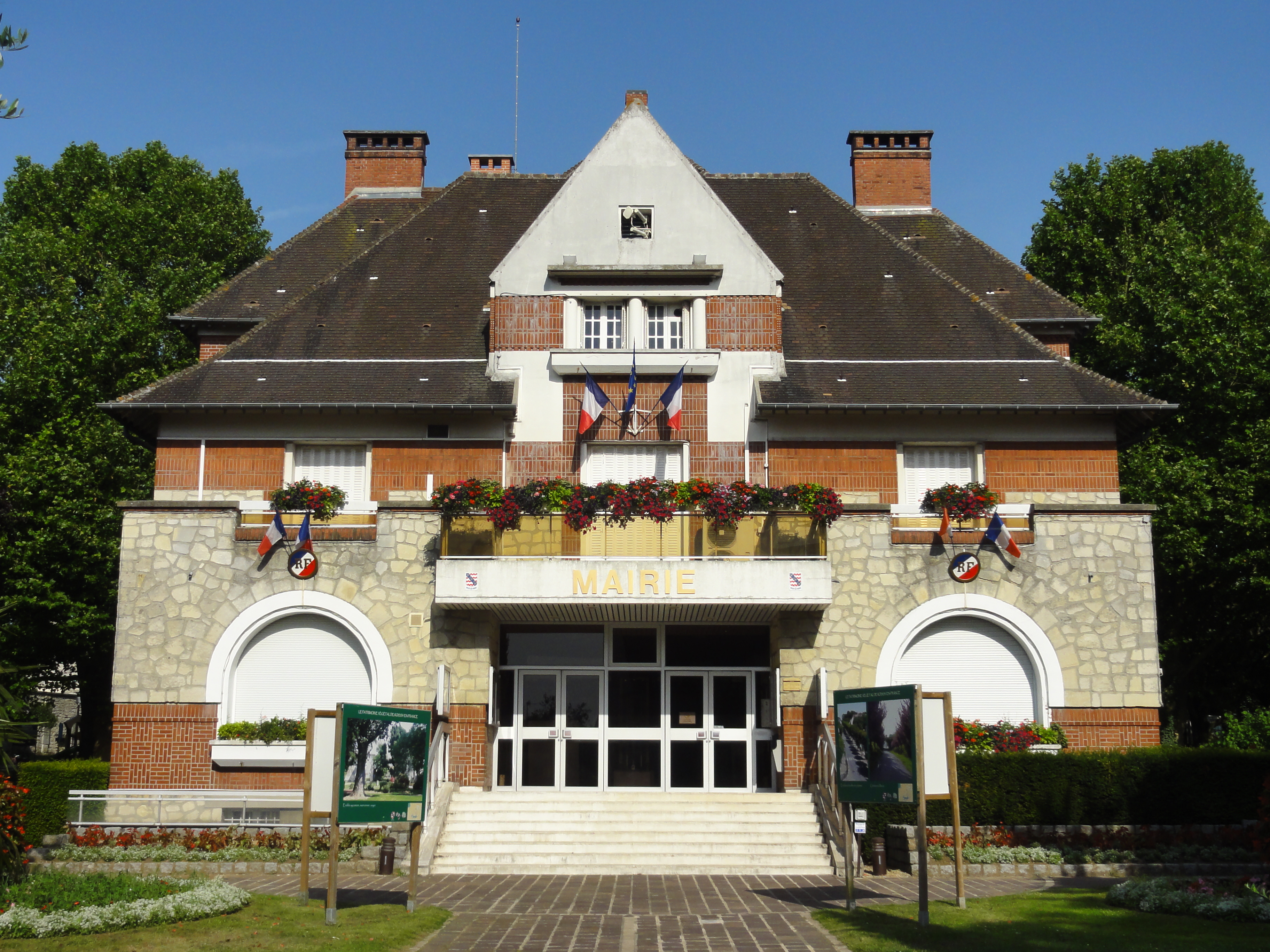 Mairie, côté ouest.